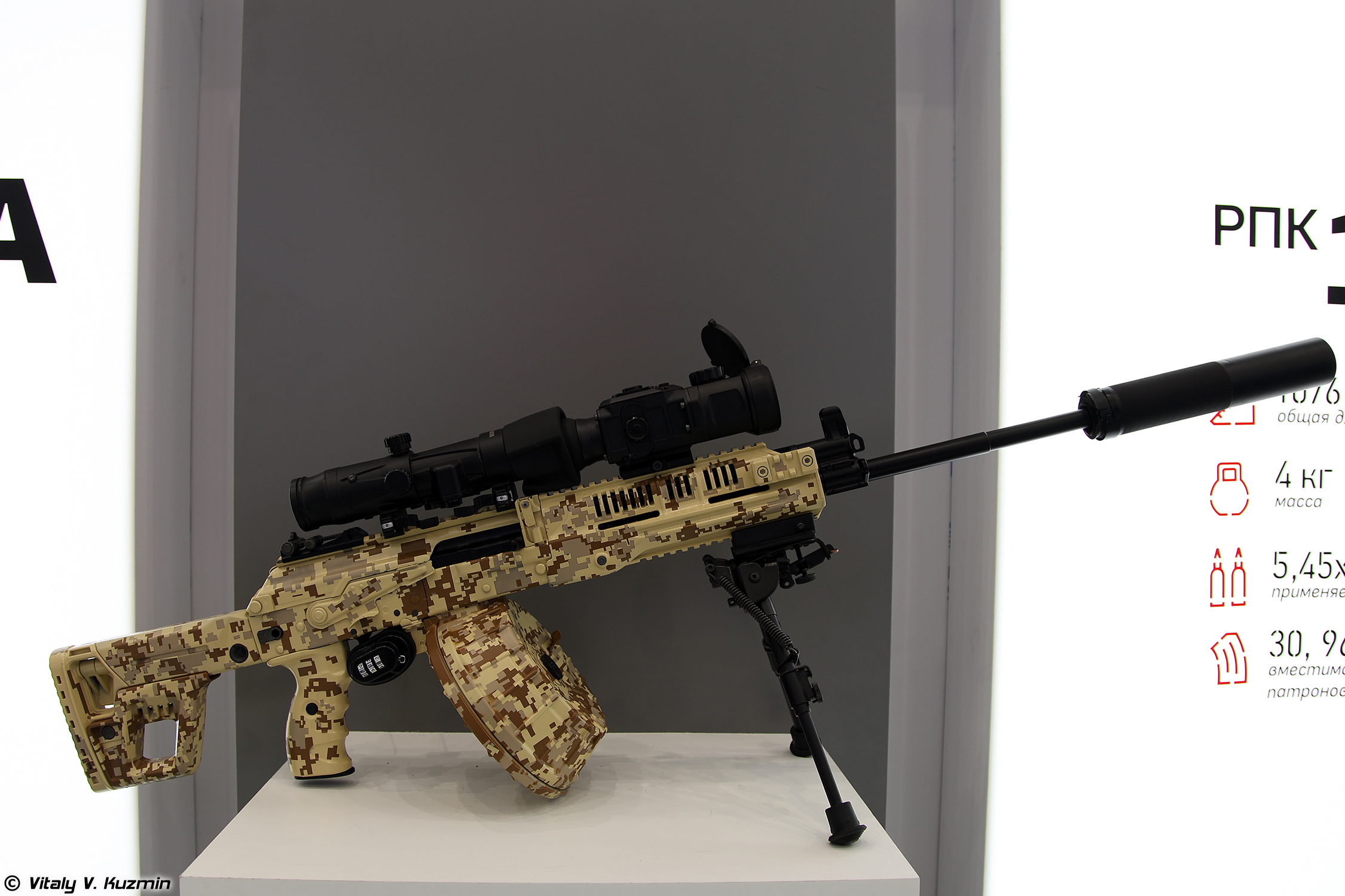 Ручной пулемет РПК-16